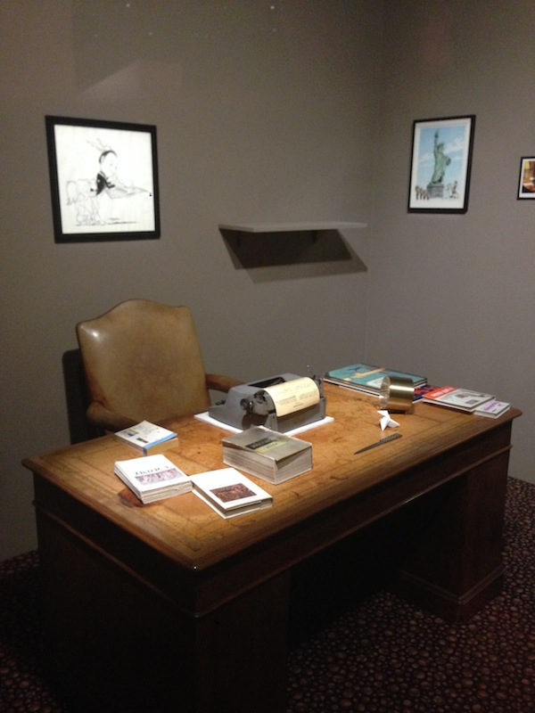 Exposition Astérix à la BnF en présence d'Albert Uderzo